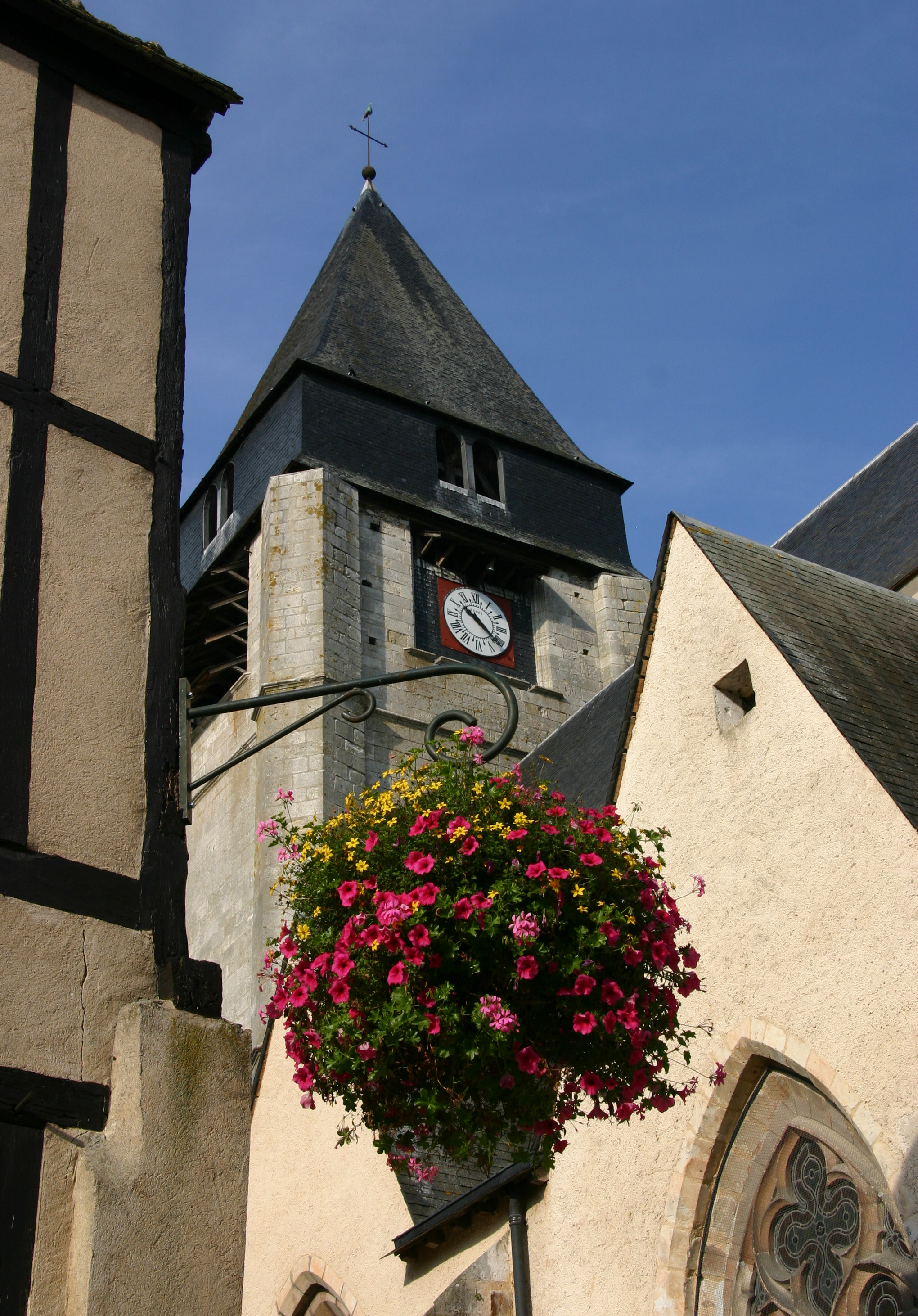 Aubigny-sur-Nère